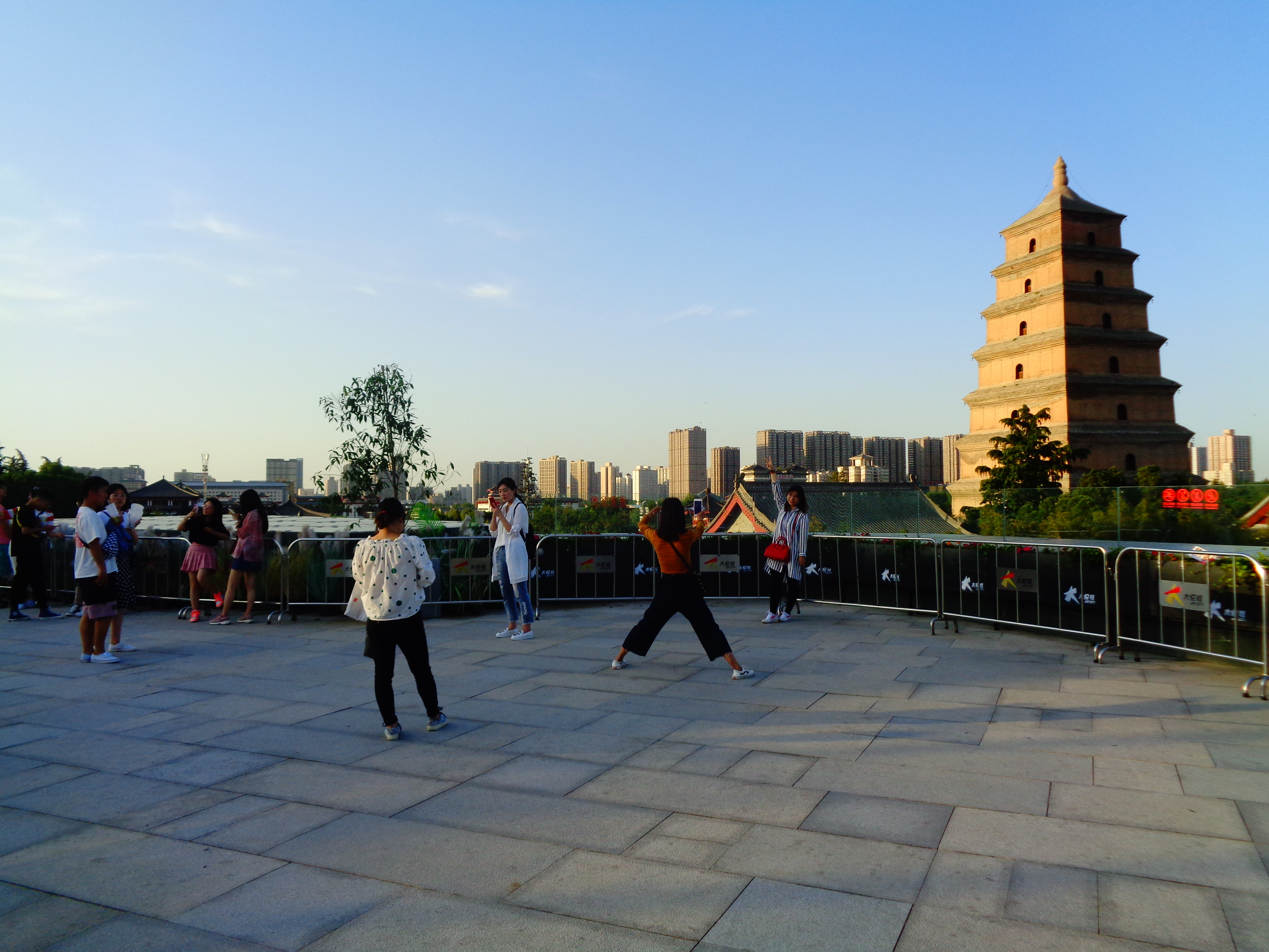 西安市雁塔区慈恩西路67号